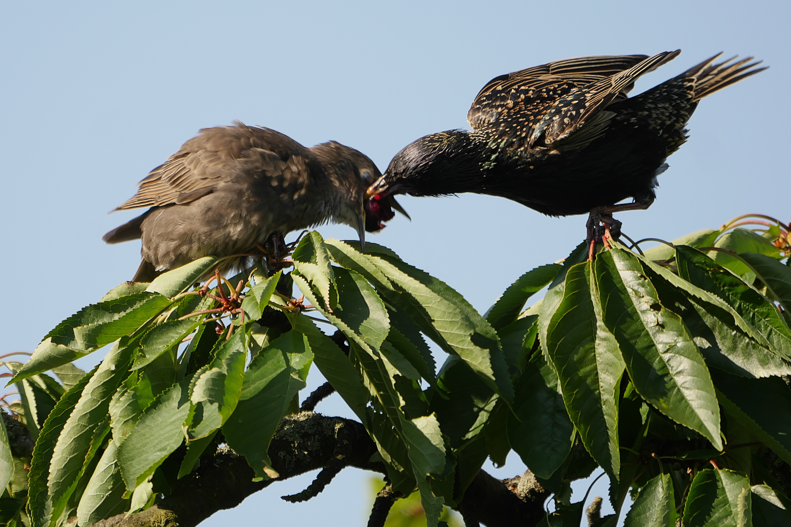 Star-Pärchen mit Kirsche auf Kirschbaum